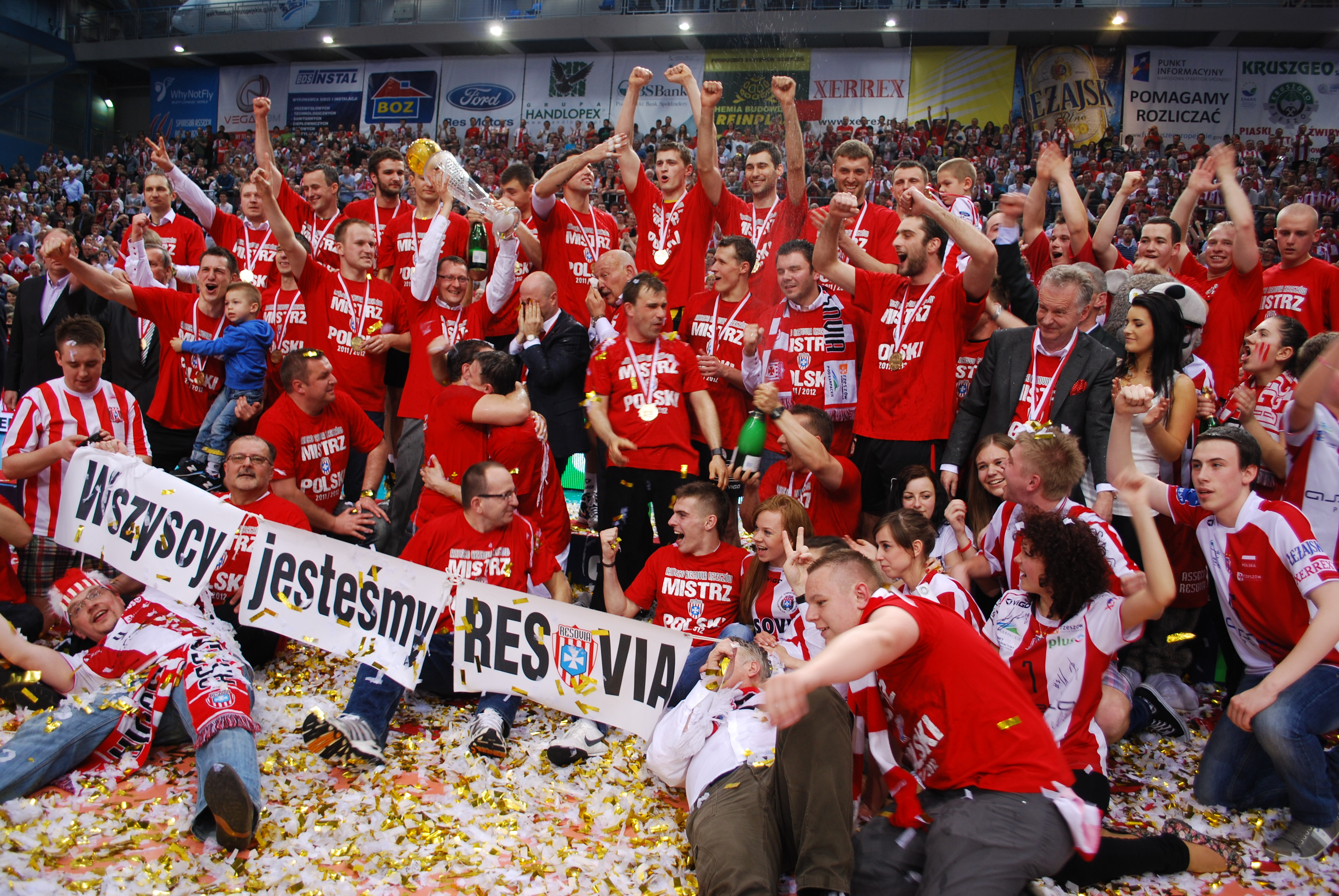 Asseco Resovia Rzeszów Mistrzem Polski. Finał PlusLigi 2011/2012. Rzeszów.